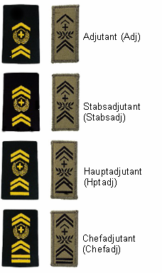 Schweizer Armee - Gradabzeichen Höhere Unteroffiziere